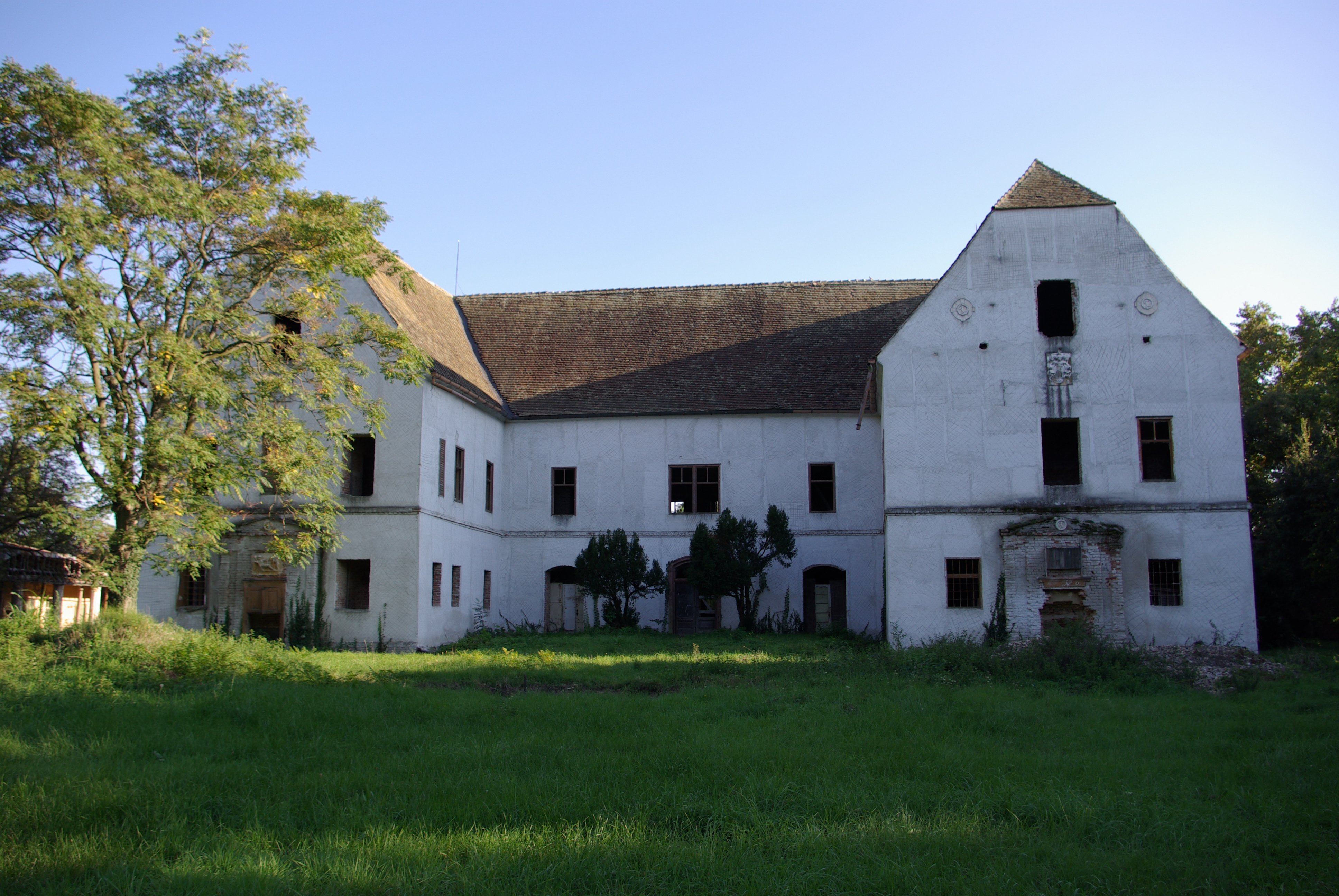 Castelul/Conacul Banloc, 2007 01